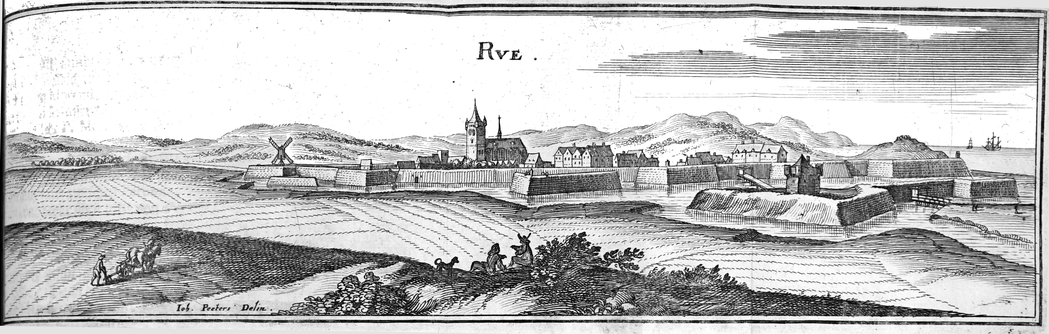 Rue, Somme, vue dans Topographiae Galliae.